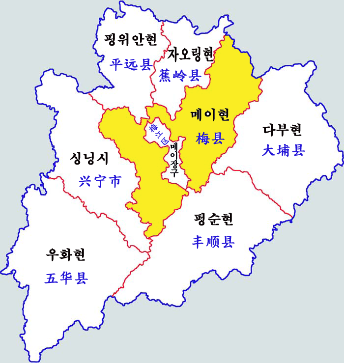 메이저우시 현급행정구역